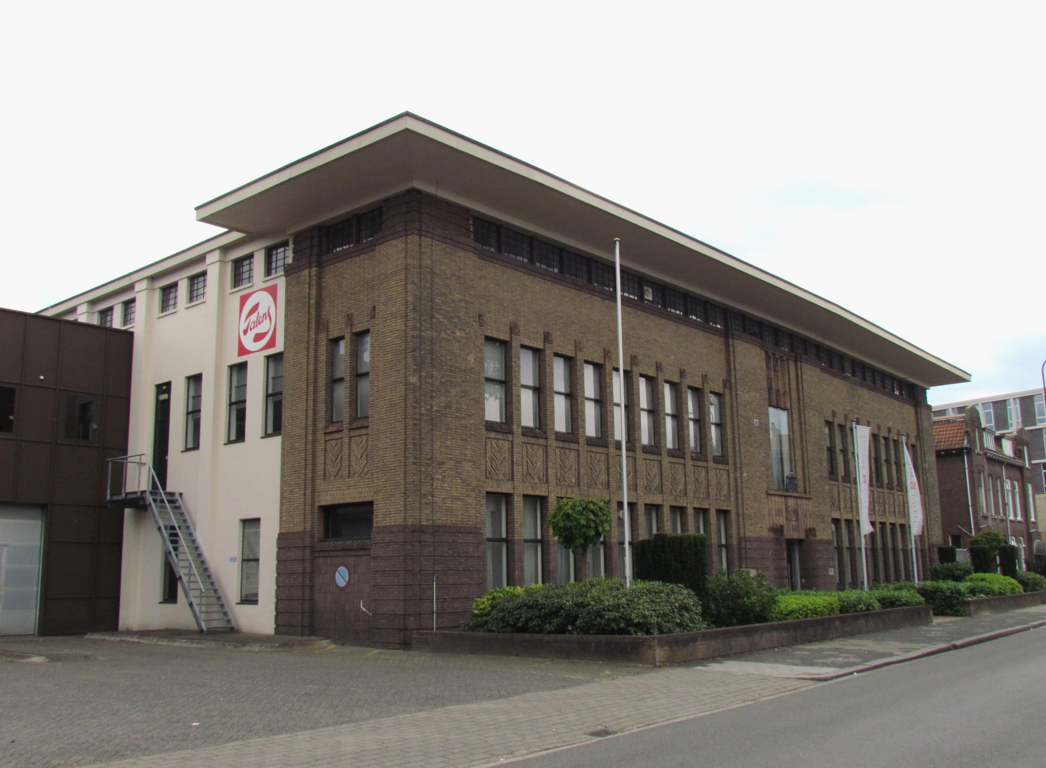 Bedrijfspand van Royal Talens, een producent van verven, (druk)inkt en aanverwante materialen. Sophialaan 46, Apeldoorn; industrieel monument